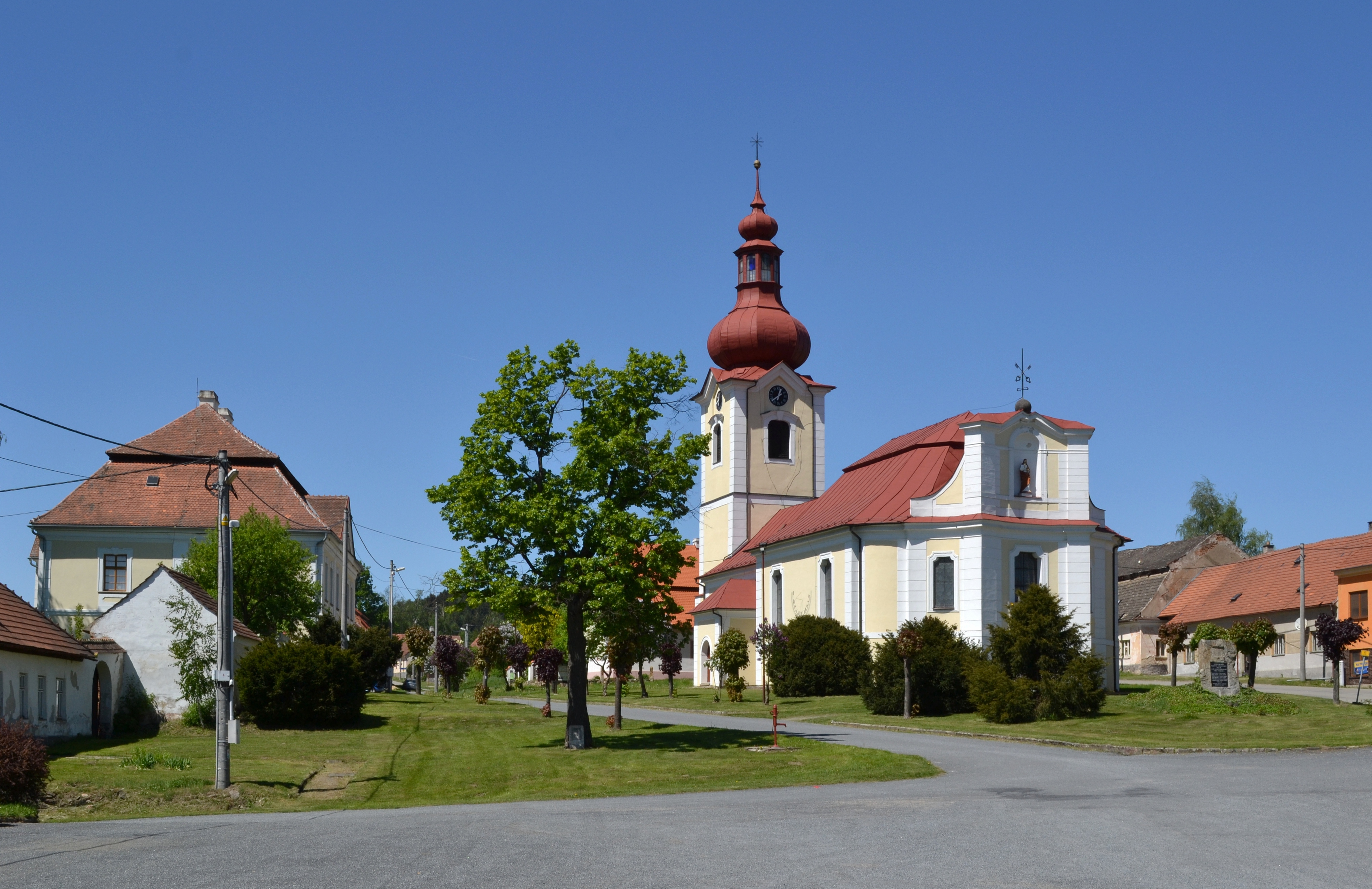 Horní Bobrová - náves s kostelem od východu